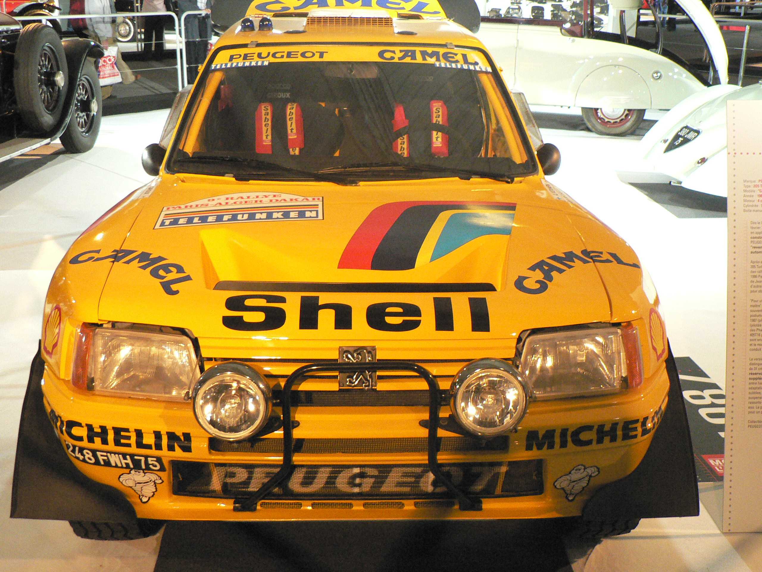 Mondial de l automobile de Paris (October 2006)